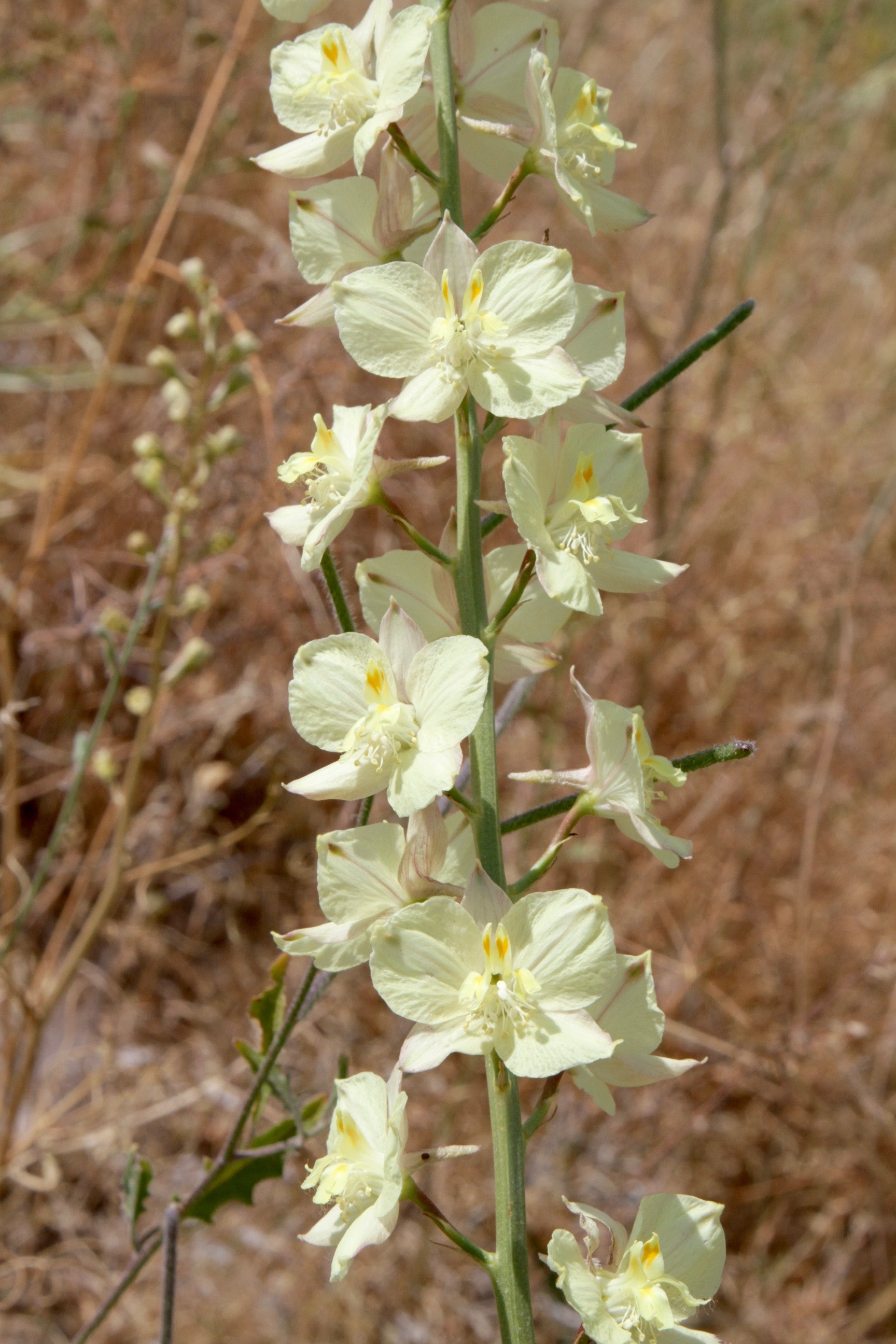 Uzbekistan, Kugitang range, Surkhanskiy Nature Reserve. Rus: Узбекистан, Сурхандарьинская обл., Шерабадский р-н, вост. склон хр. Кугитангтау, Сурханский государственный заповедник.